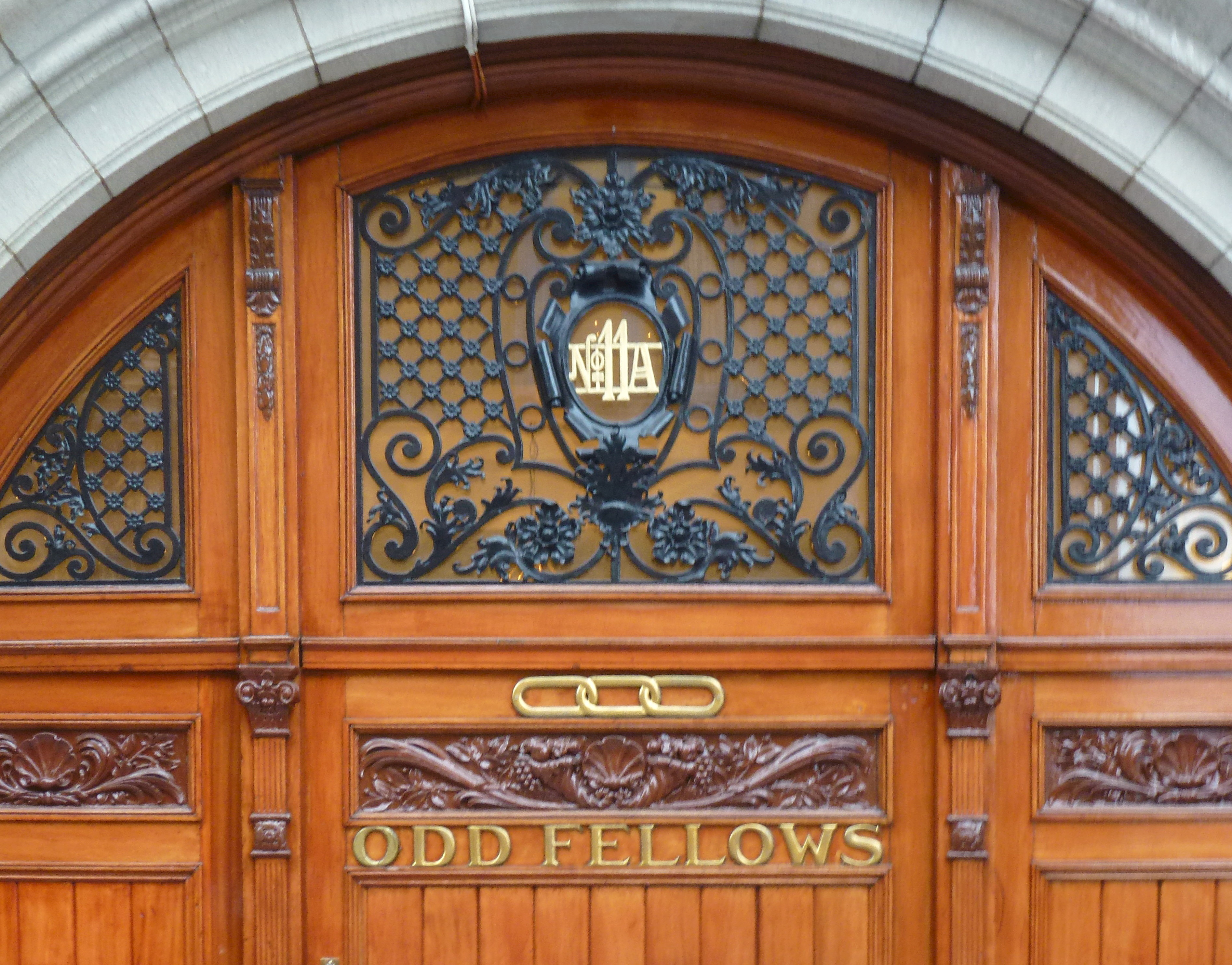 Odd Fellows Västra Trädgårdsgatan 11A, Stockholm. Banérska palatset, Västra Trädgårdsgatan 11A, Stockholm. Idag är huset Oberoende Odd Fellow Ordens svenska storloges säte. Palatset byggdes om för ändamålet 1923 efter arkitekterna Knut Nordenskjölds och Gustaf Adolf Falks ritningar.